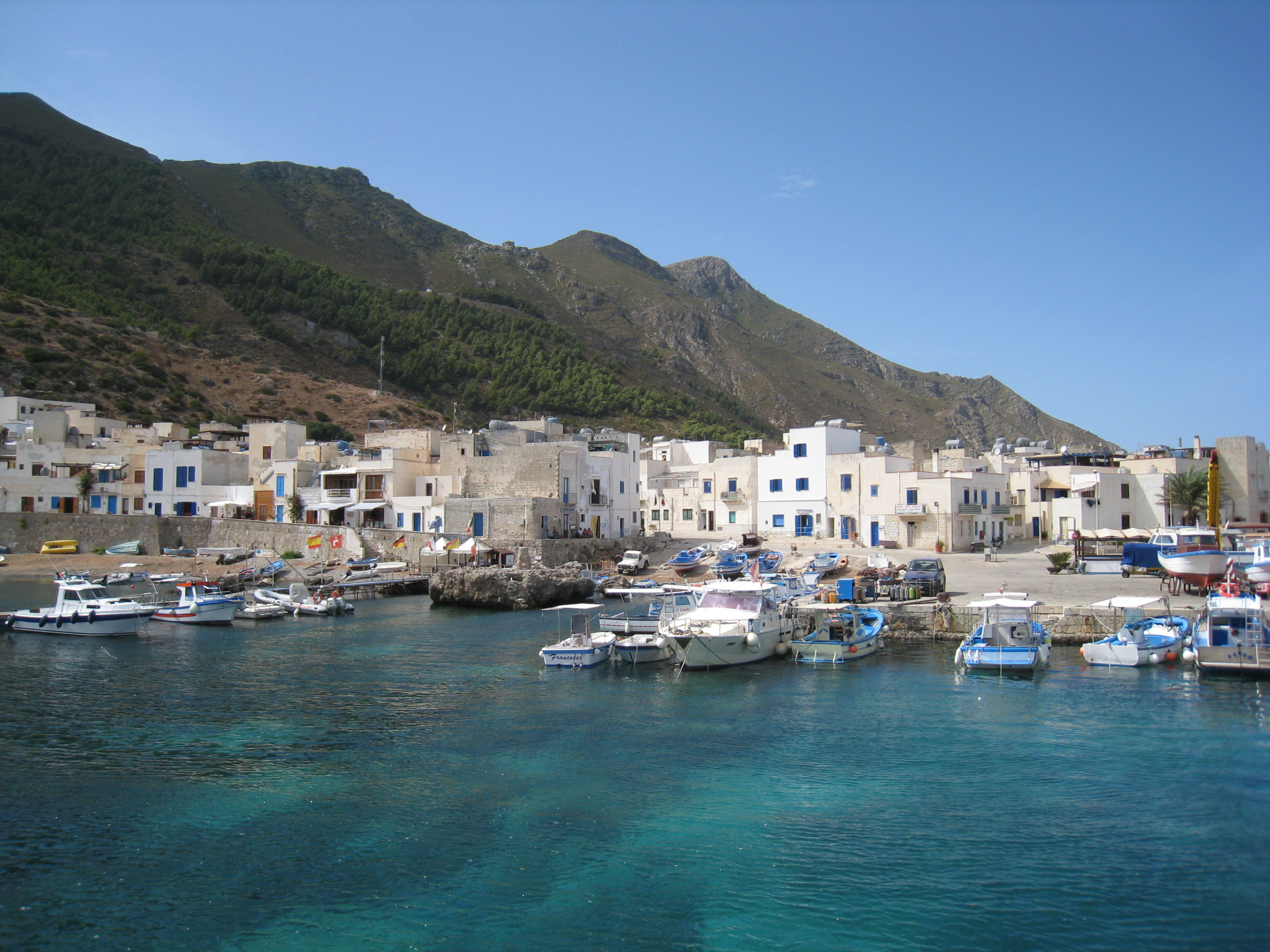 Marettimo